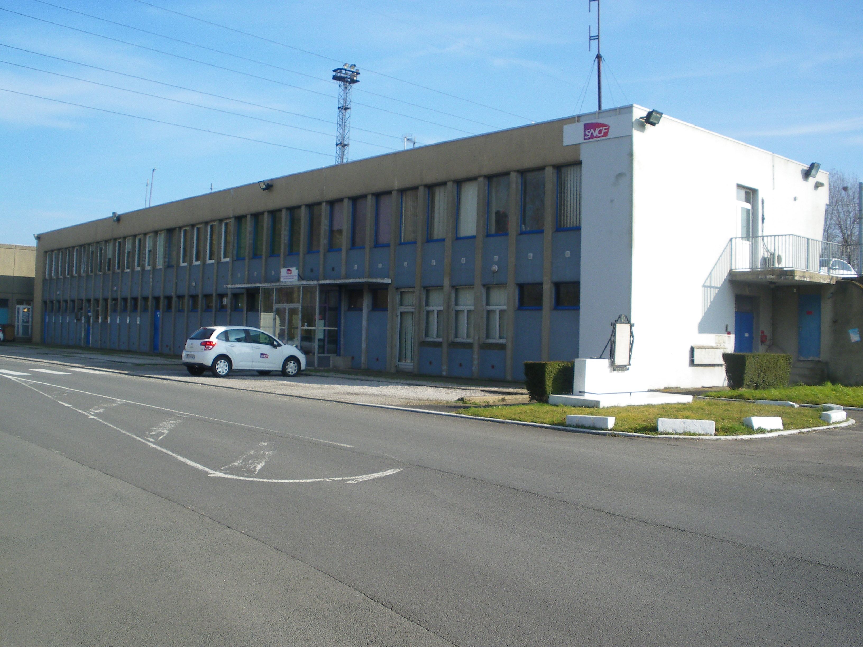 Vue d'un bâtiment SNCF situé près de la halte ferroviaire voyageurs de Courghain.